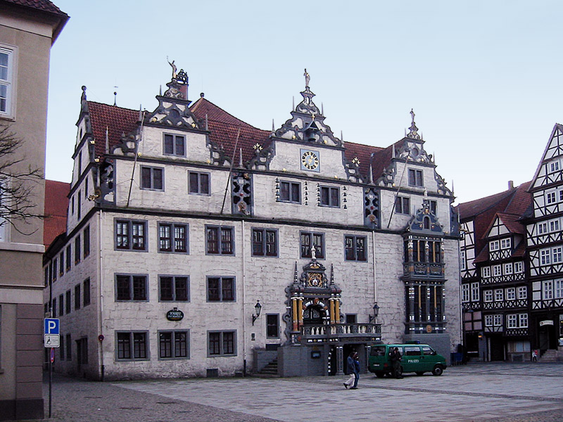 Rathaus der Stadt Hann. Münden im Stil der Weserrenaissance